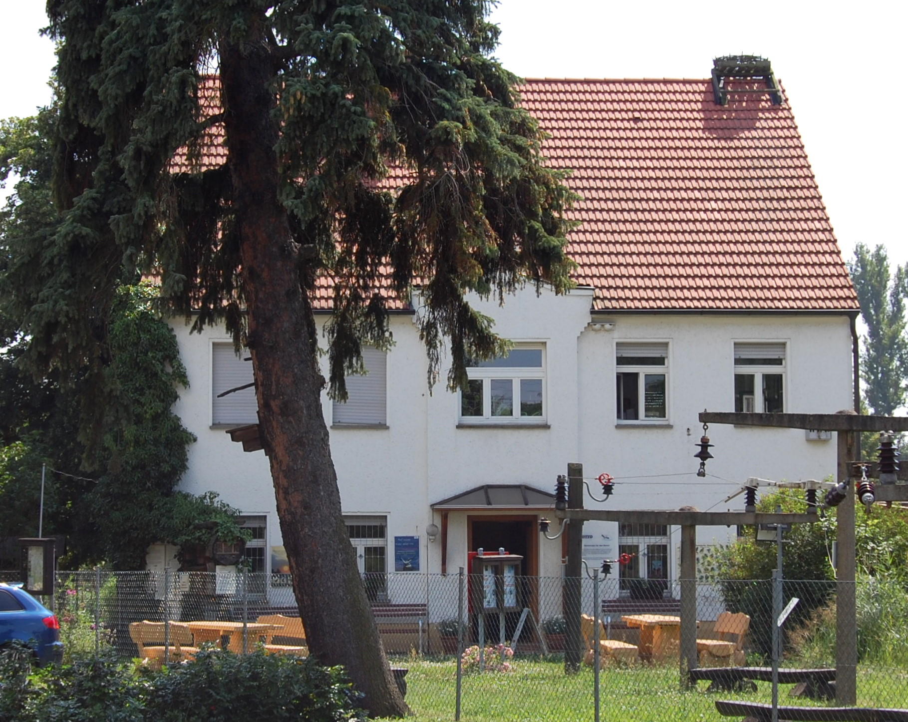 Vetschau/Spreewald, Storchenzentrum, ehemaliges Hospital "Zum heiligen Kreuz"